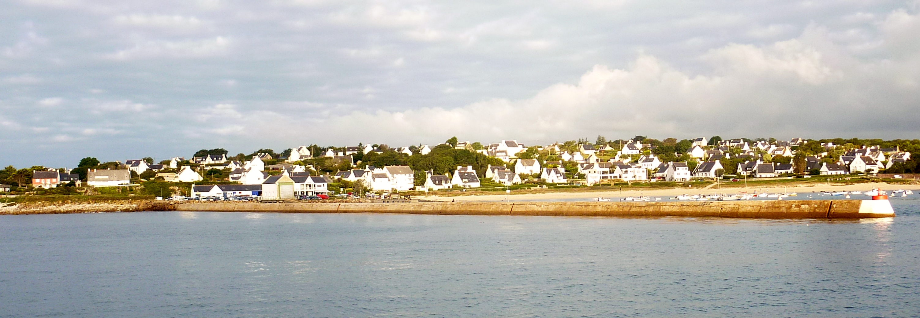 Le littoral d'Esquibien vu du large en quittant le port de Sainte-Évette.